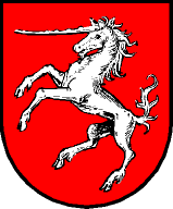 Wappen von Nußdorf am Haunsberg im Salzburg im Bezirk Salzburg-Umgebung in Österreich.